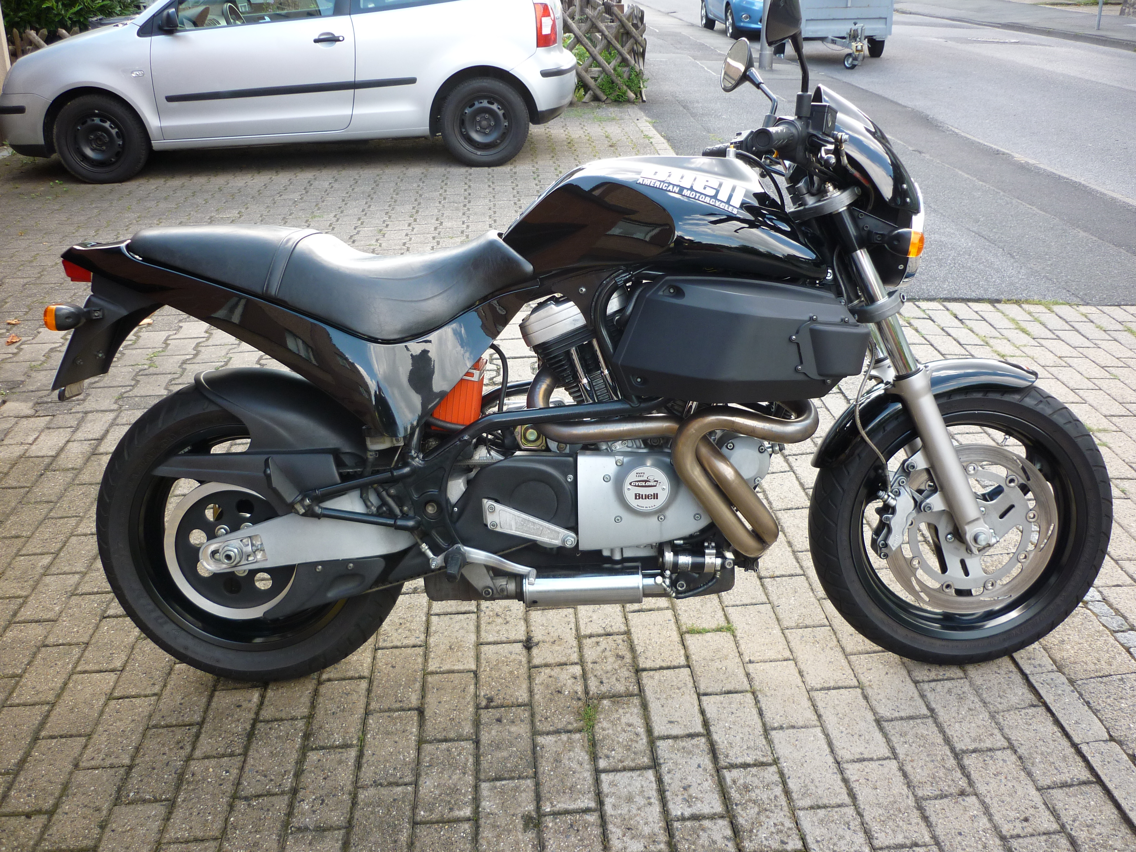 Buell M2 Cyclone (breites Heck ab 1999)